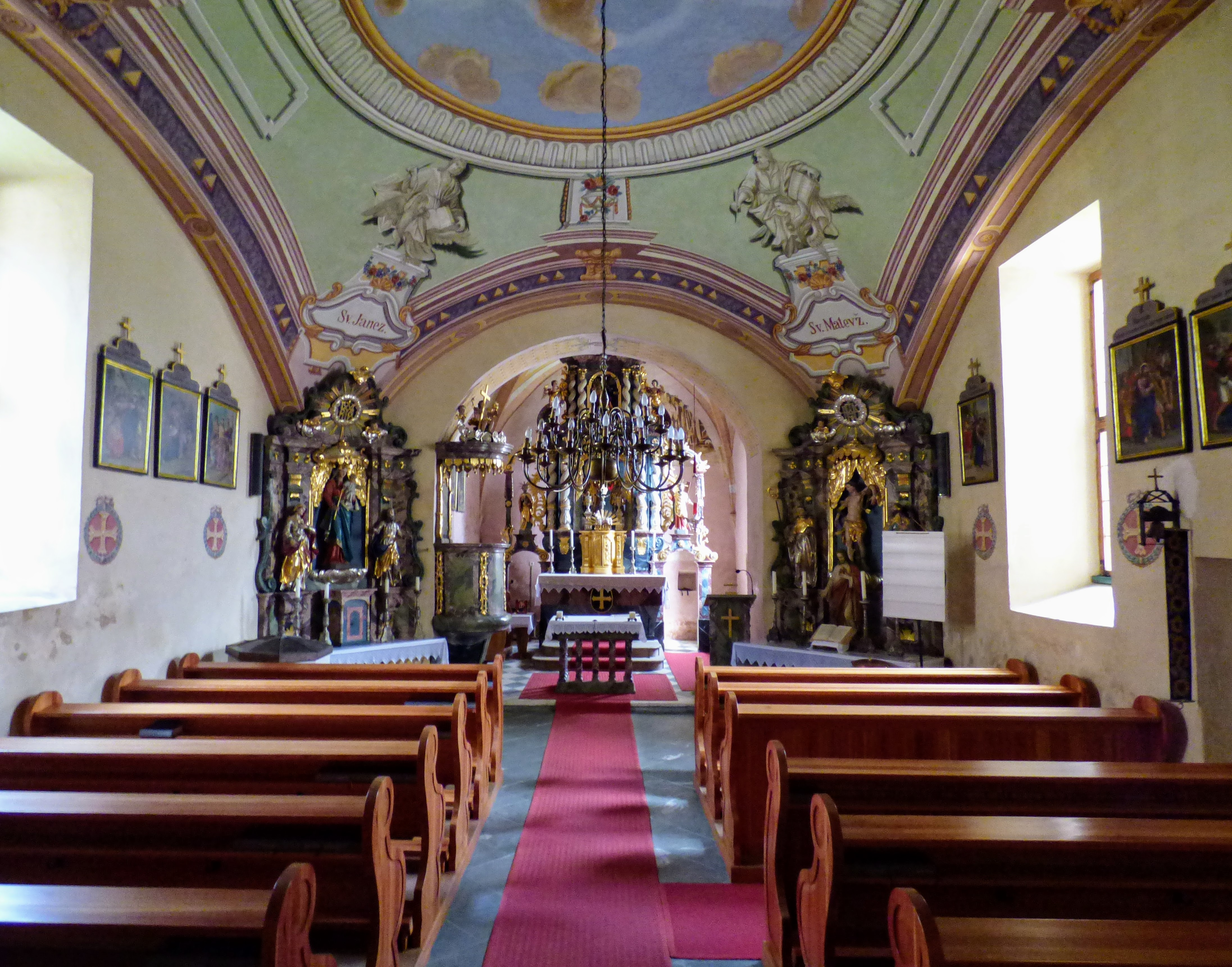 Kirche St. Stefan bei Niedertrixen, Gemeinde Völkermarkt, Kärnten. Inneres: Deckengemälde, drei Altäre